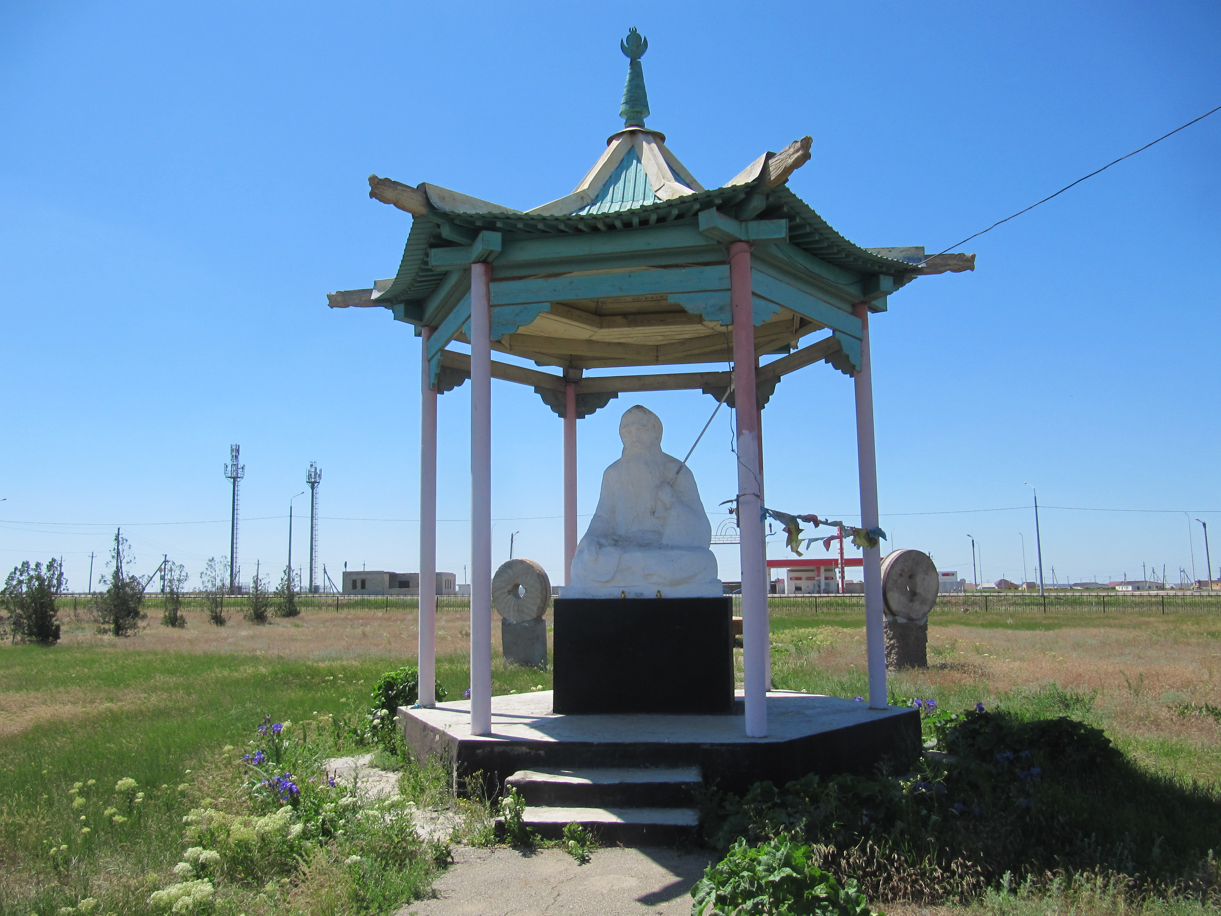 Белый старец в Троицком